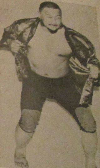 Professor Tanaka sur une affiche de catch du 24 juin 1972